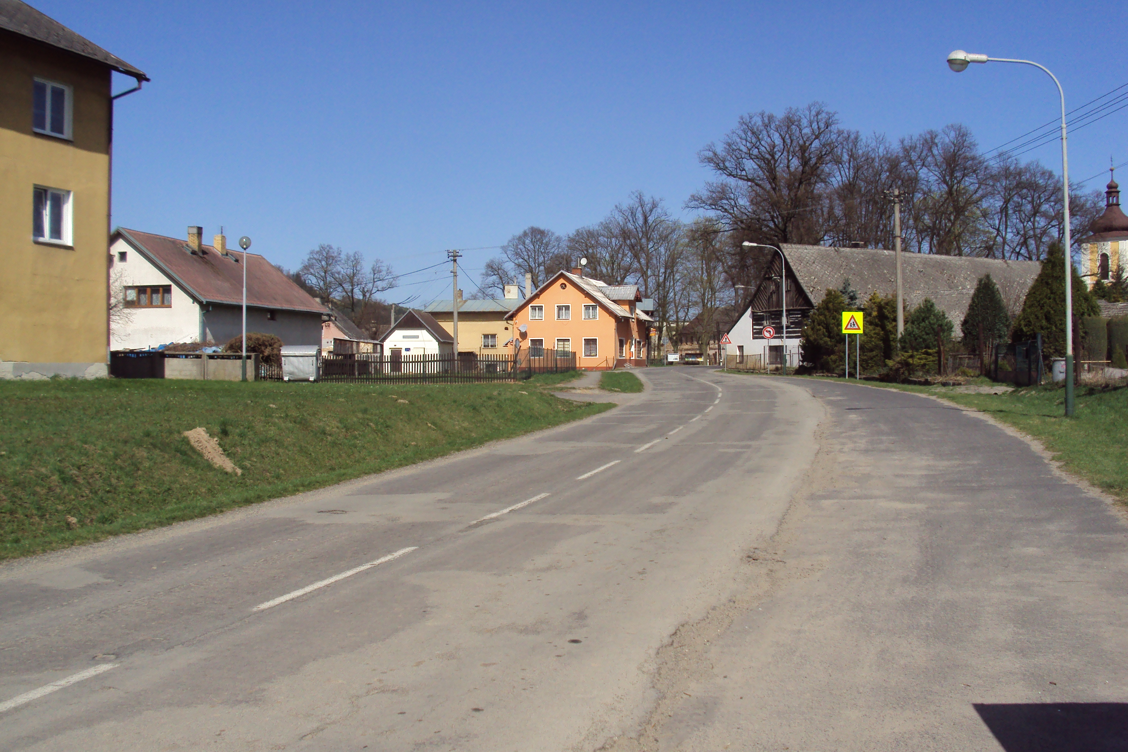 Silnice 273 přes obec Okna zhruba ve středu